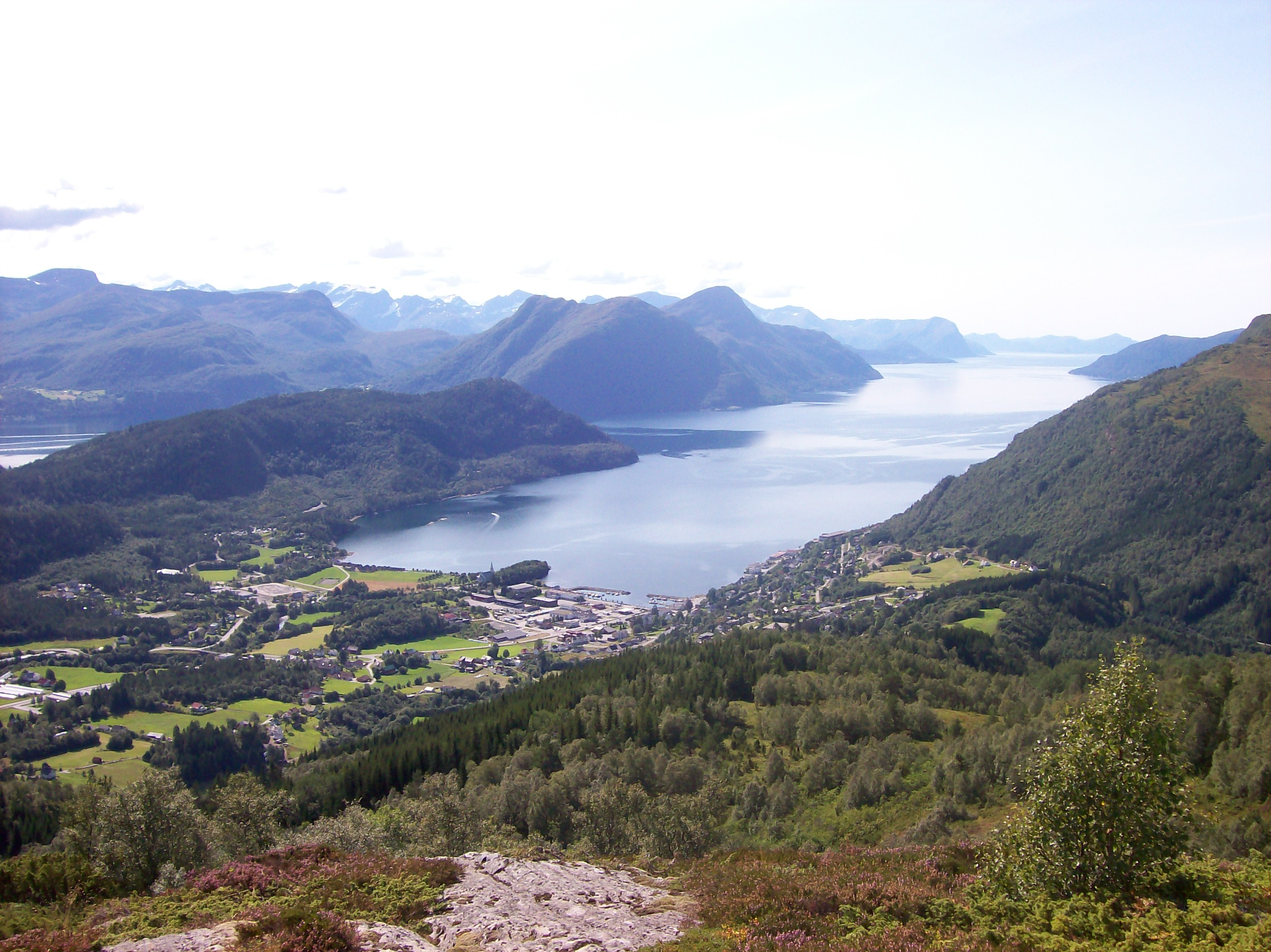 Sjøholt sentrum i Ørskog kommune. Utsikt fra "Verahornet".